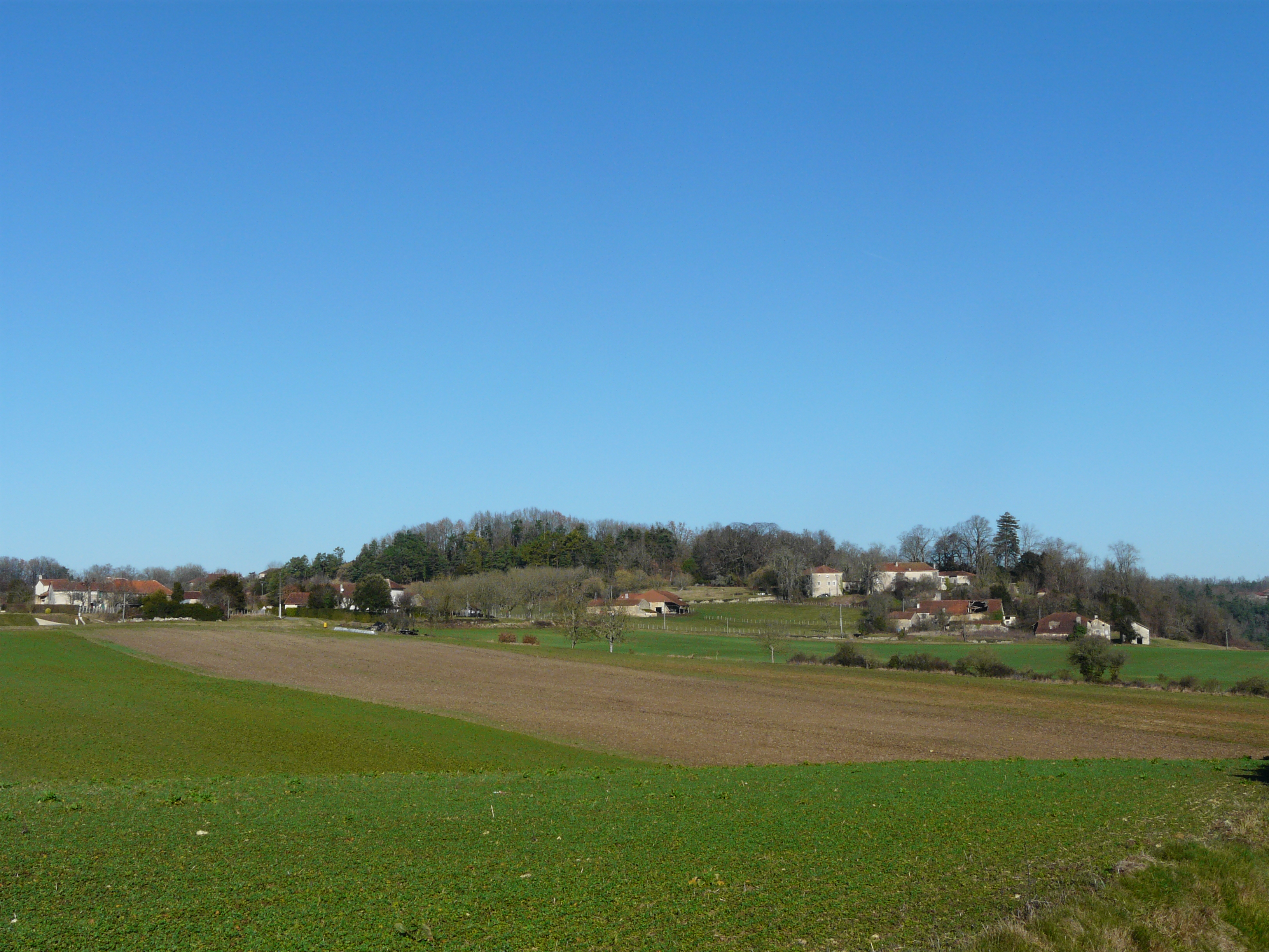 Les hameaux des Bourgougnoux à gauche et de Saint-Michel sur la droite ; Cantillac, Dordogne, France.